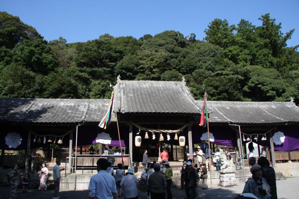 大分県杵築市大田にある白鬚田原神社